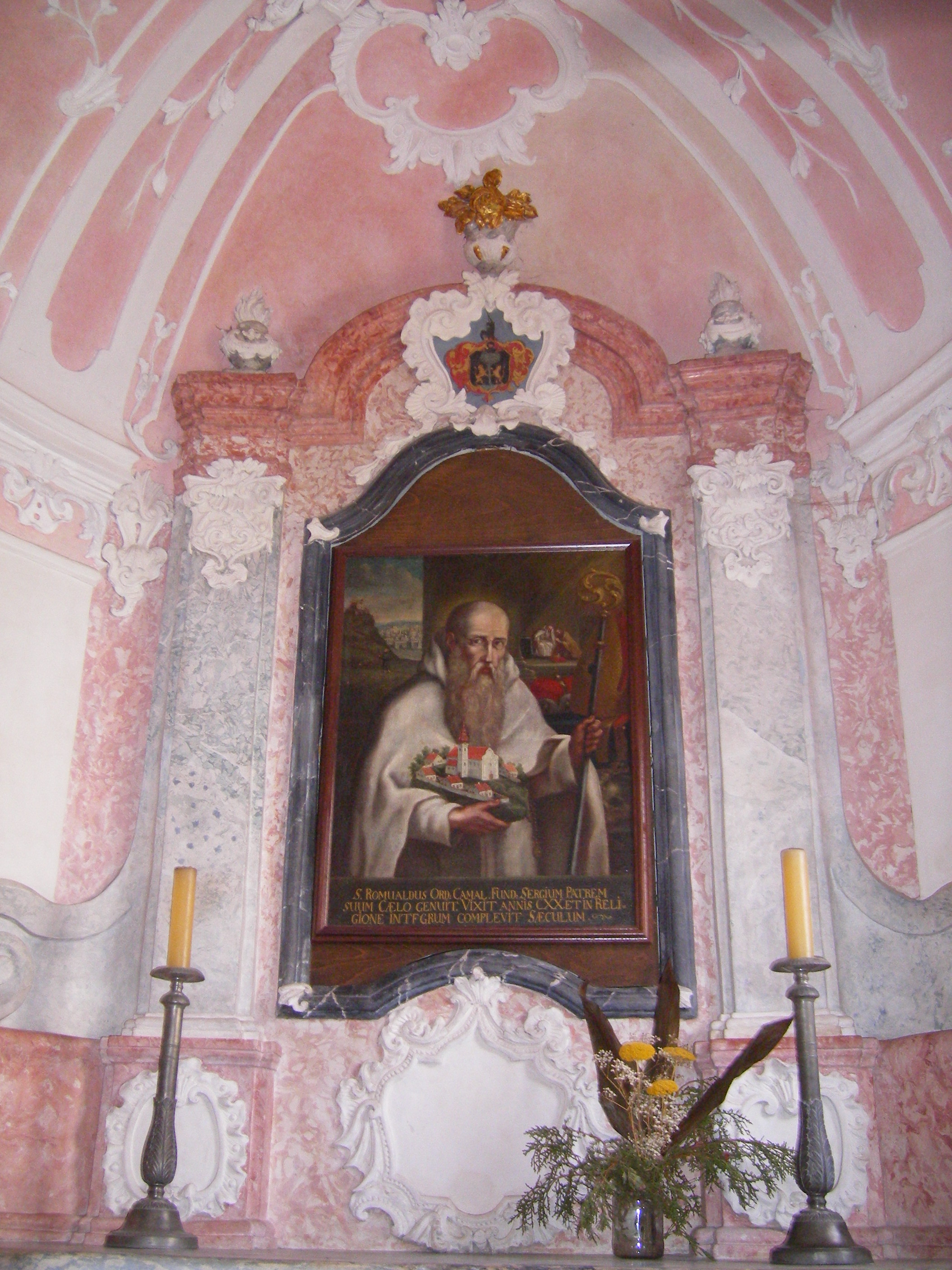 Oroszlány - majkpusztai kamalduli apátság